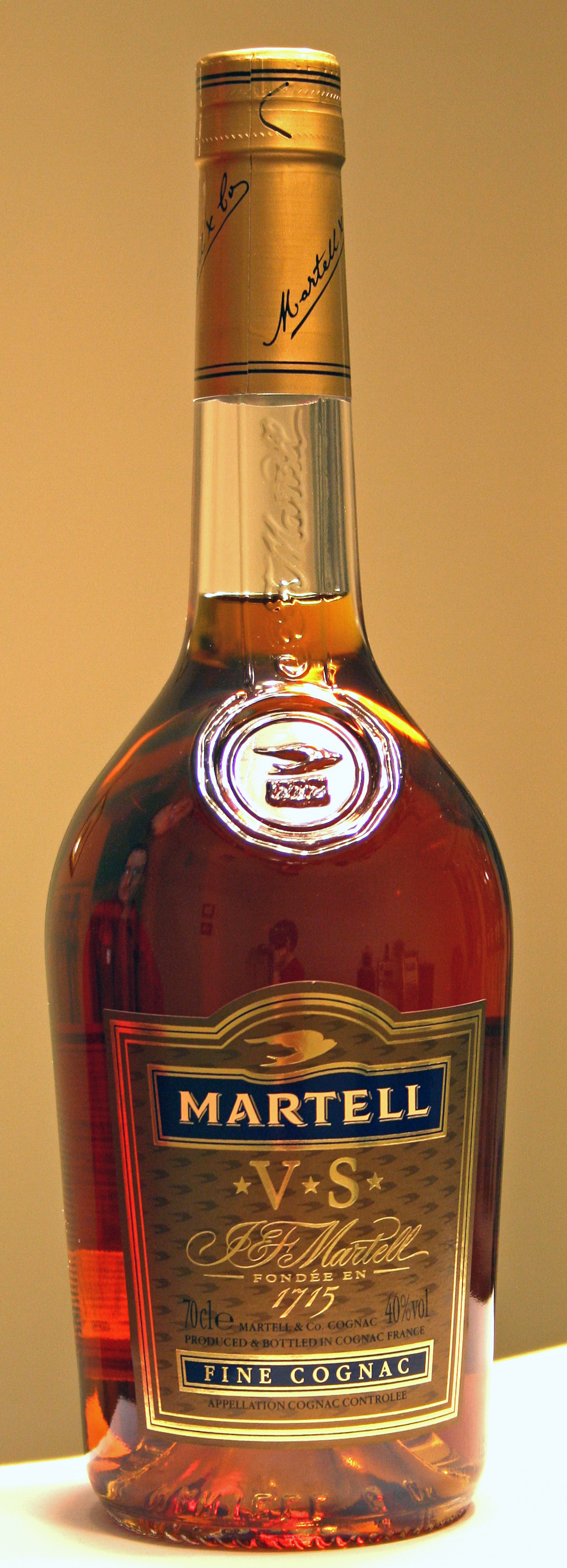 koniak Matrel (en: Cognac Martell)